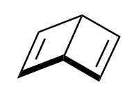 structure of Dewar benzene